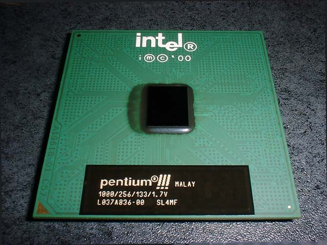 Pentium III Processor.